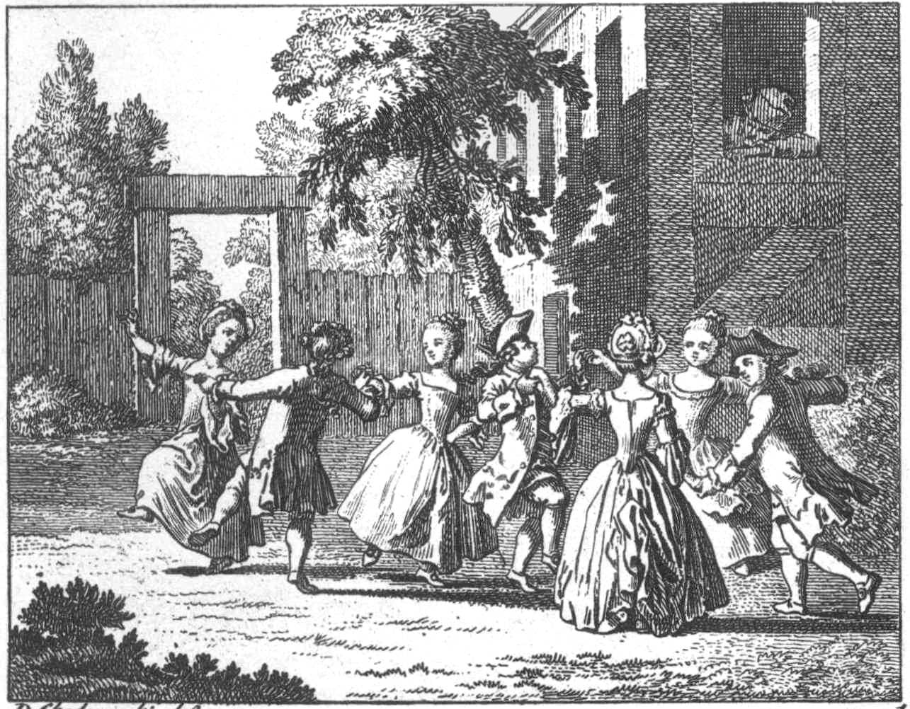 Vergnügungen der Kinder. c) Tänzer und Tänzerinnen. Der zuschauende Großvater. (Beschreibung lt. Quelle)